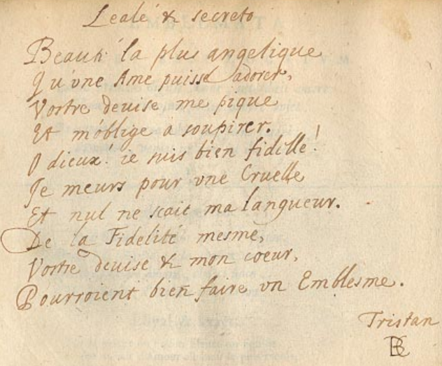 Tristan L'Hermite (1601-1655) - Extrait des Manuscrits de Glasgow (après 1608)